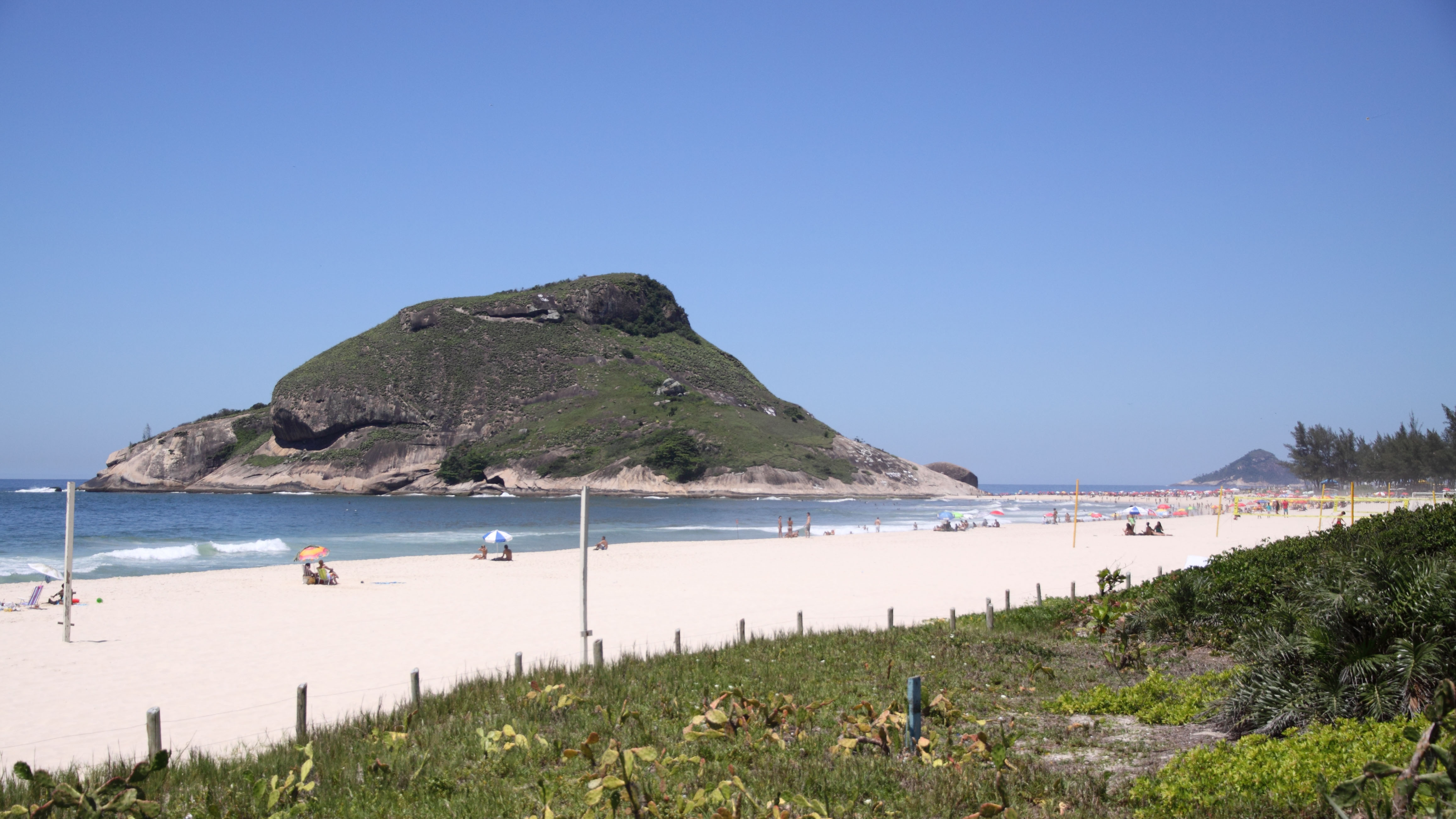 Pontal de Sernambetiba (Tim Maia), no Recreio dos Bandeirantes.